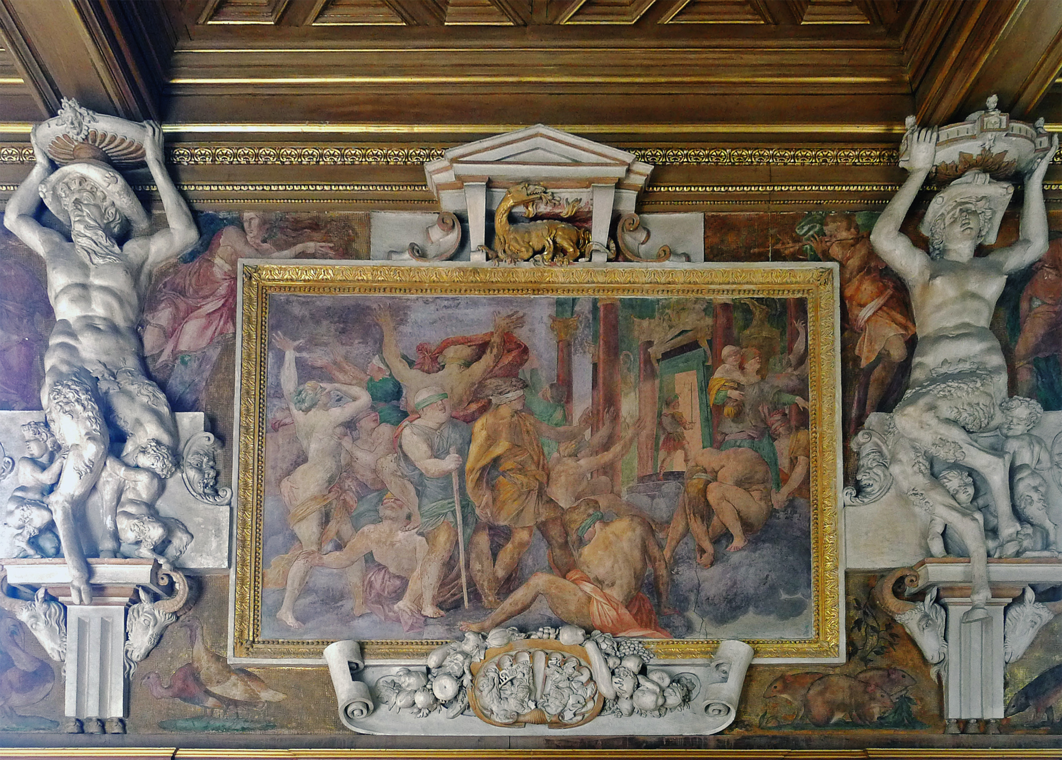 Château de Fontainebleau .